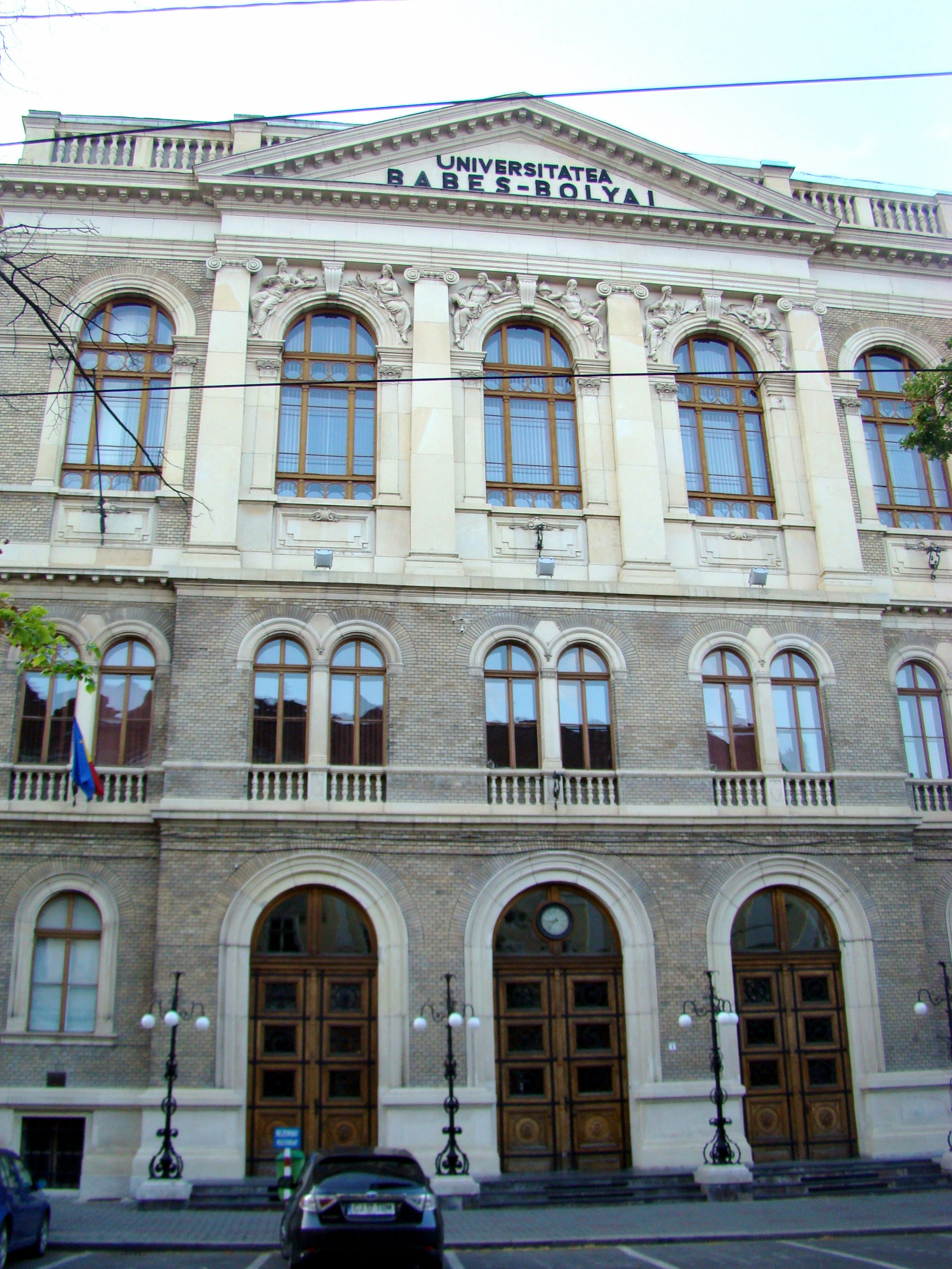 Universitatea "Babeș Bolyai"